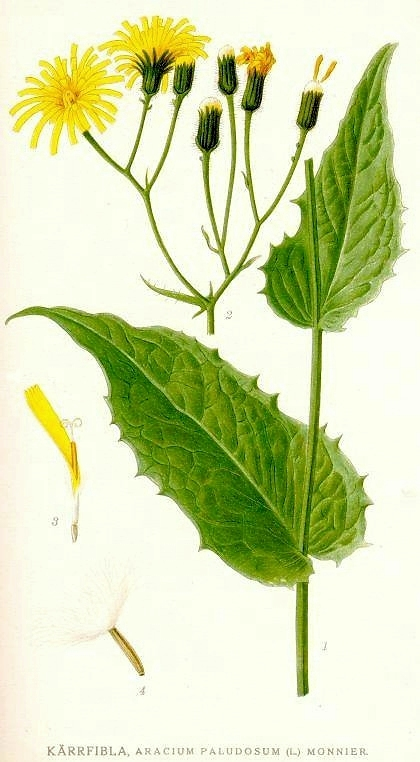 Crepis paludosa (L.) Moench, syn. Aracium paludosum (L.) Monnier Original Description Kärrfibla, Aracium paludosum (L.) Monnier